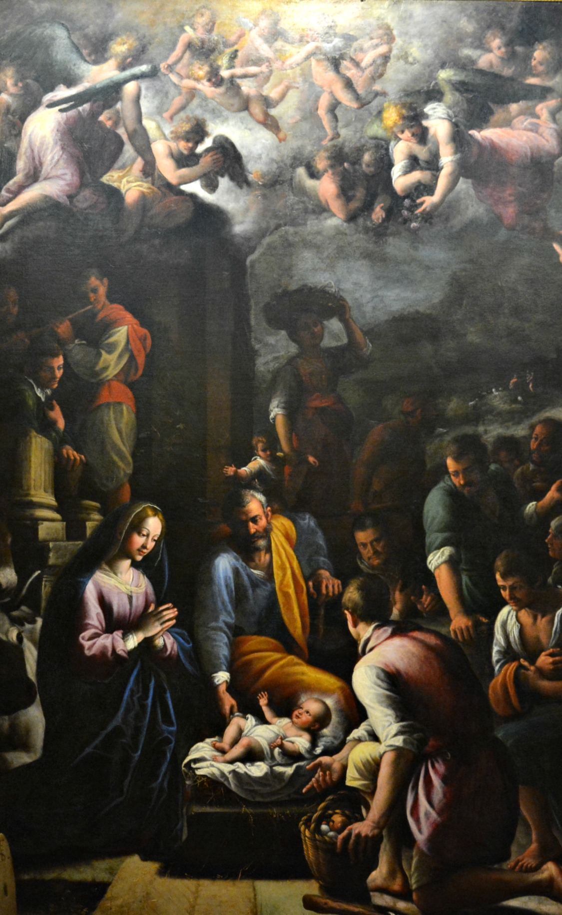 Vedi titolo